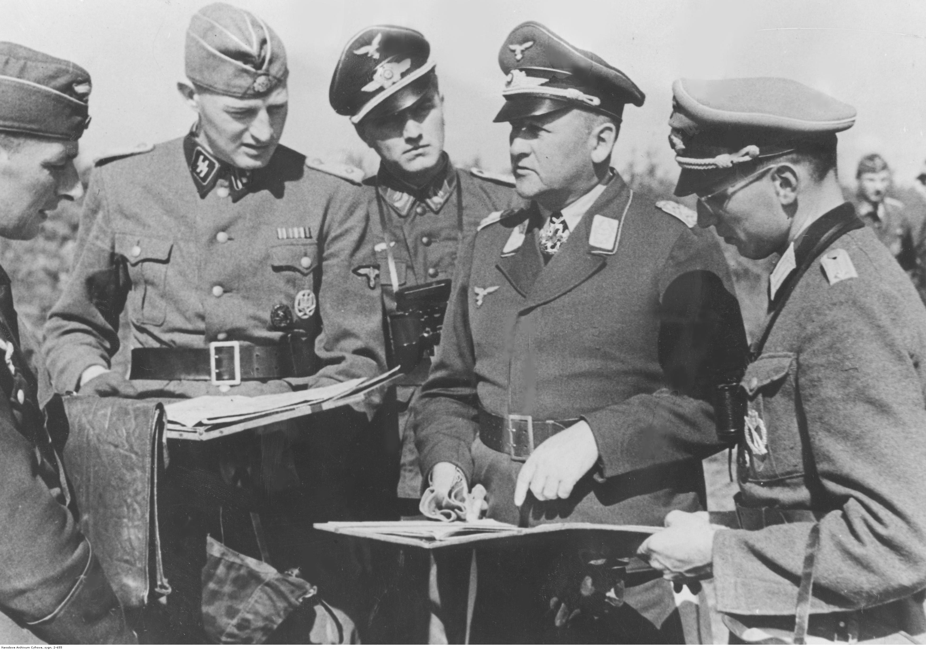 Generał Heino von Rantzau (2 z prawej) w rozmowie z oficerami (2 z lewej oficer Waffen-SS) na froncie wschodnim.